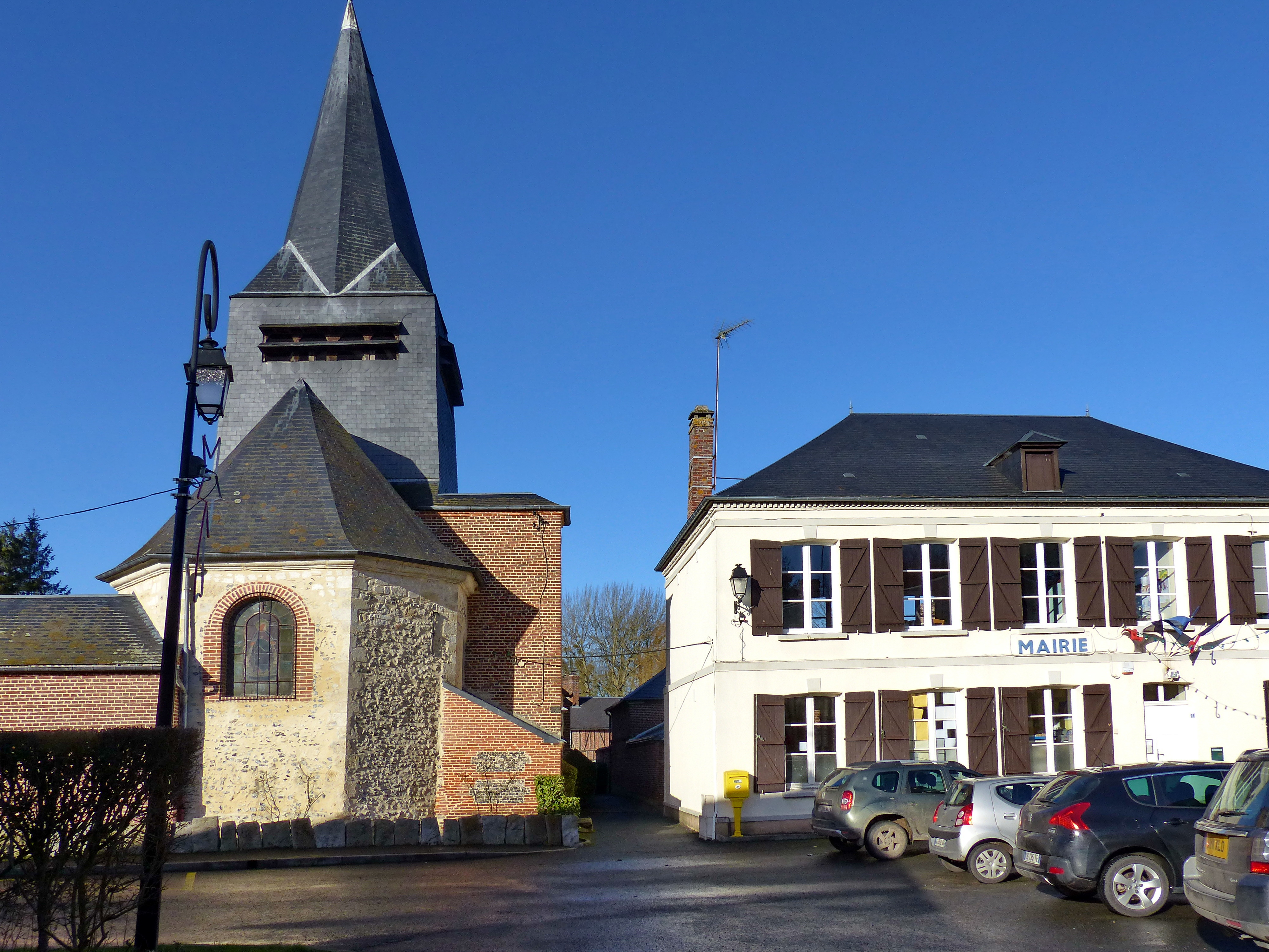 La mairie et le chevet de l'église Saint-Martin de Blicourt